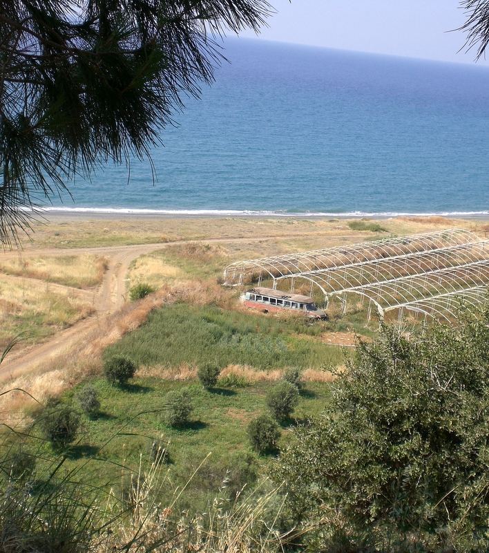 Virgin, hidden beaches in Polis.